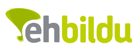 Logo de la coalición política Euskal Herria Bildu.